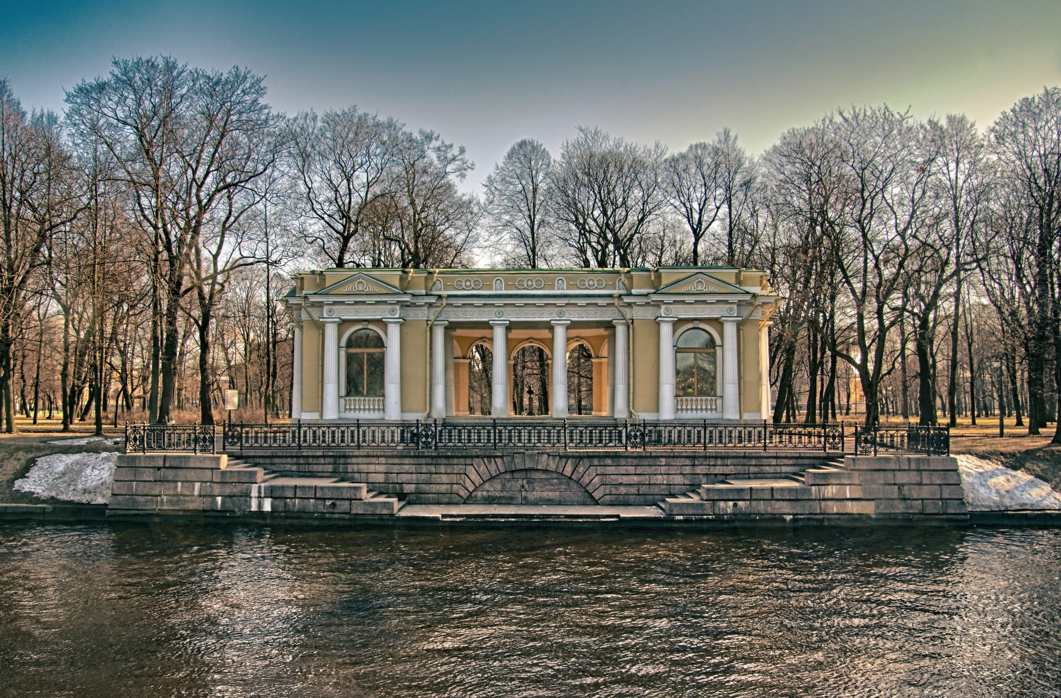 Павильон Росси в Михайловском саду.